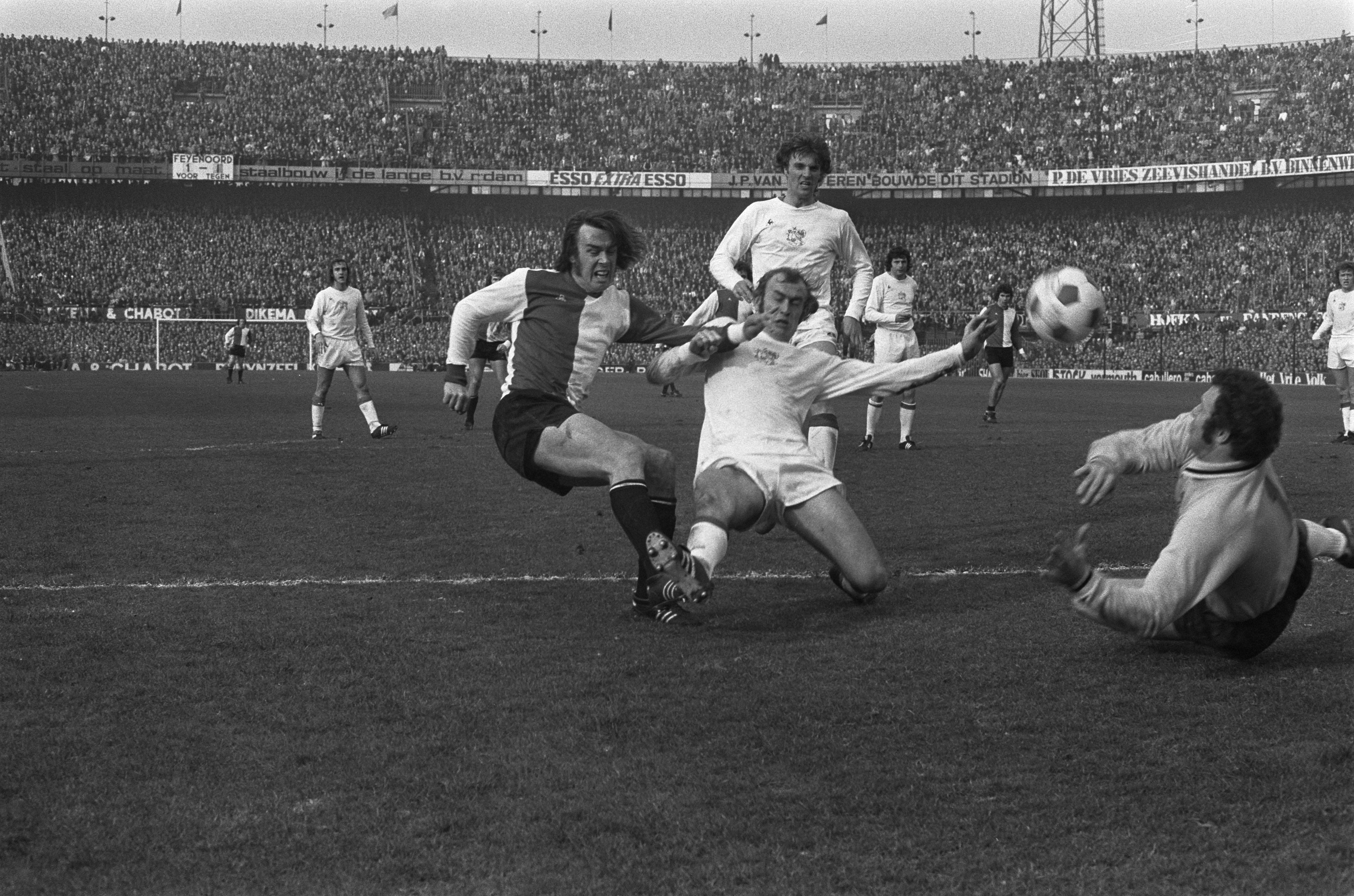 Match de football Feyenoord - Ajax (2-2) à Rotterdam, Peter Ressel (à gauche) à la lutte avec Horst Blankenburg ; à droite le gardien de but Heinz Stuy. Photographie par Punt / Anefo.